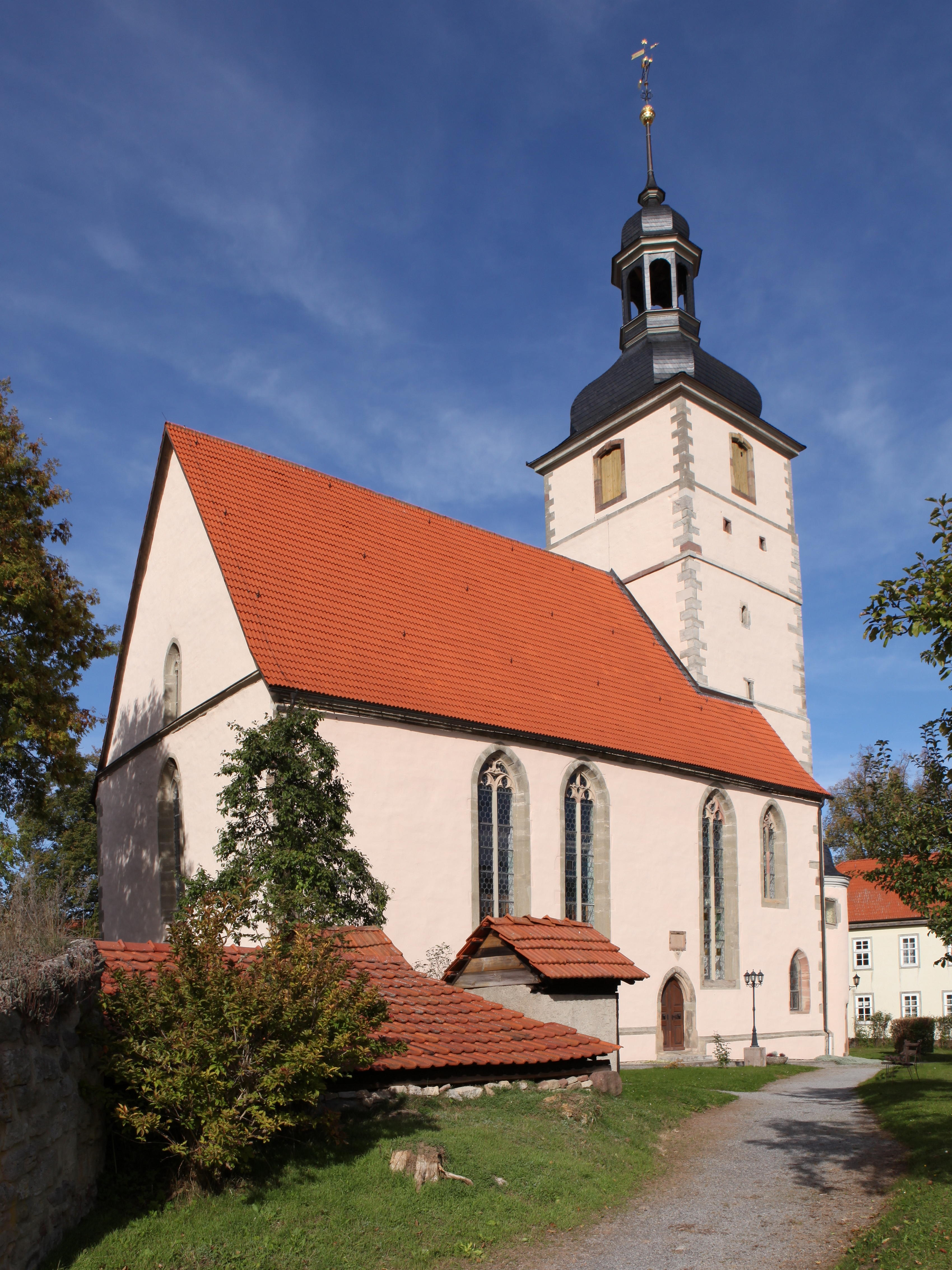 St. Johannis, Herpf